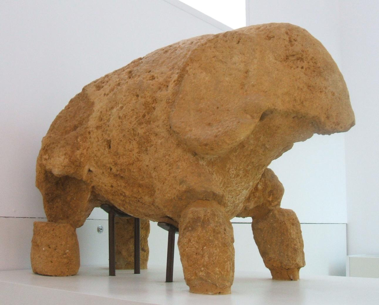 el elefante es la pieza más conocida de la tumba de ese nombre en la mecrópolis romana de Carmona.